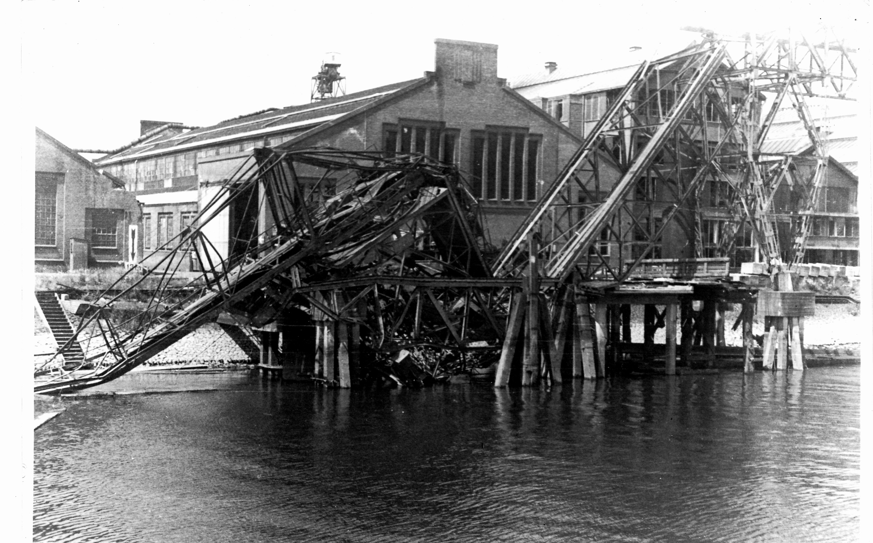 Verwoesting haveninstallaties van de RDM in 1945.